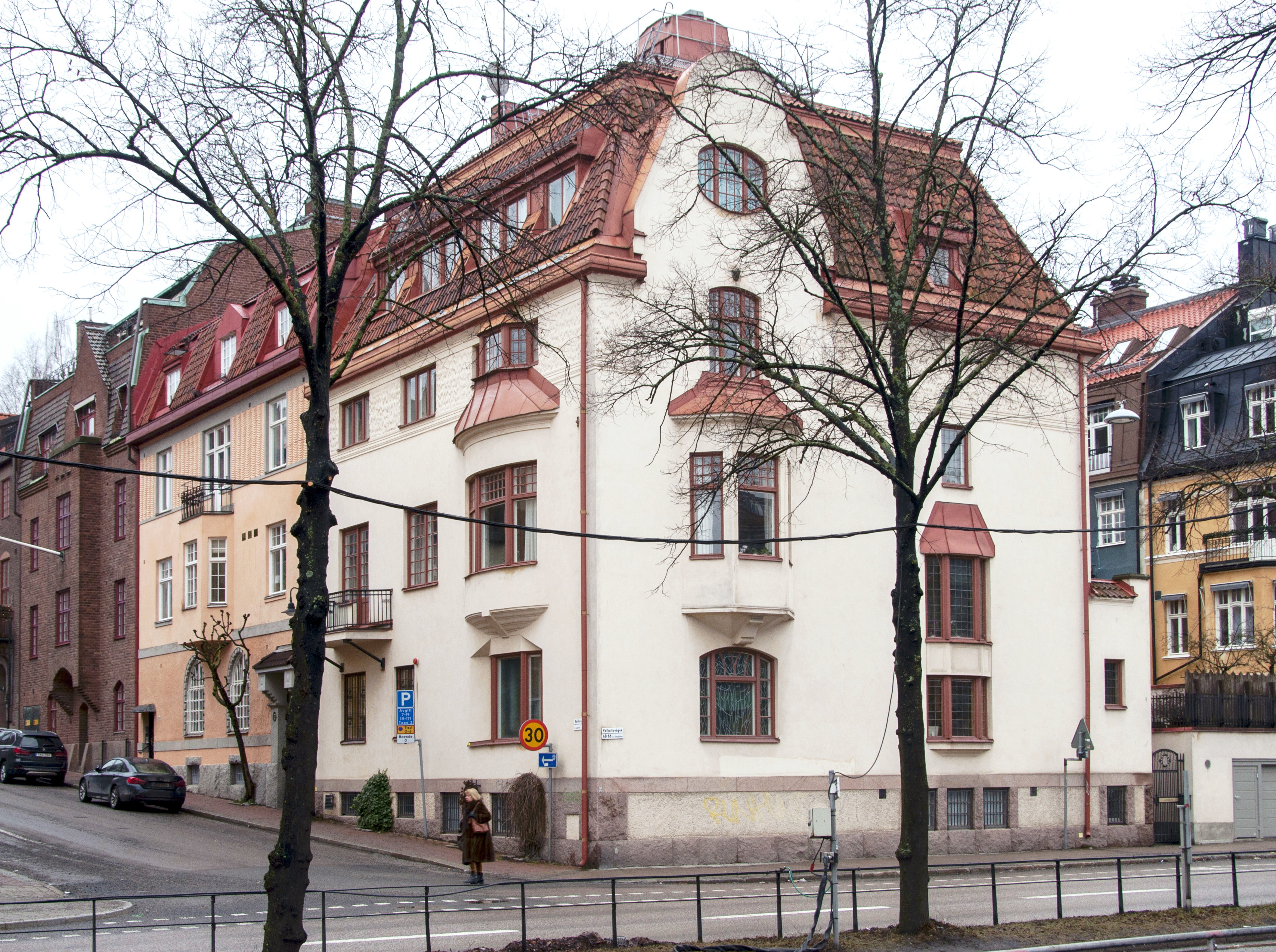 Sånglärkan 6, Valhallavägen 68 Stockholm Nybyggnadsår 1909 - 1910 Erik Lindqvist (Byggmästare) Per Olof Hallman (Arkitekt) Per Olof Hallman (Byggherre)